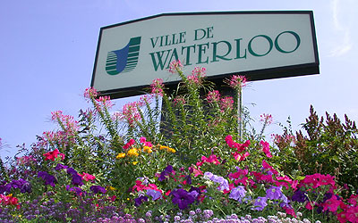 Une affiche indiquant les bordures de la ville de Waterloo